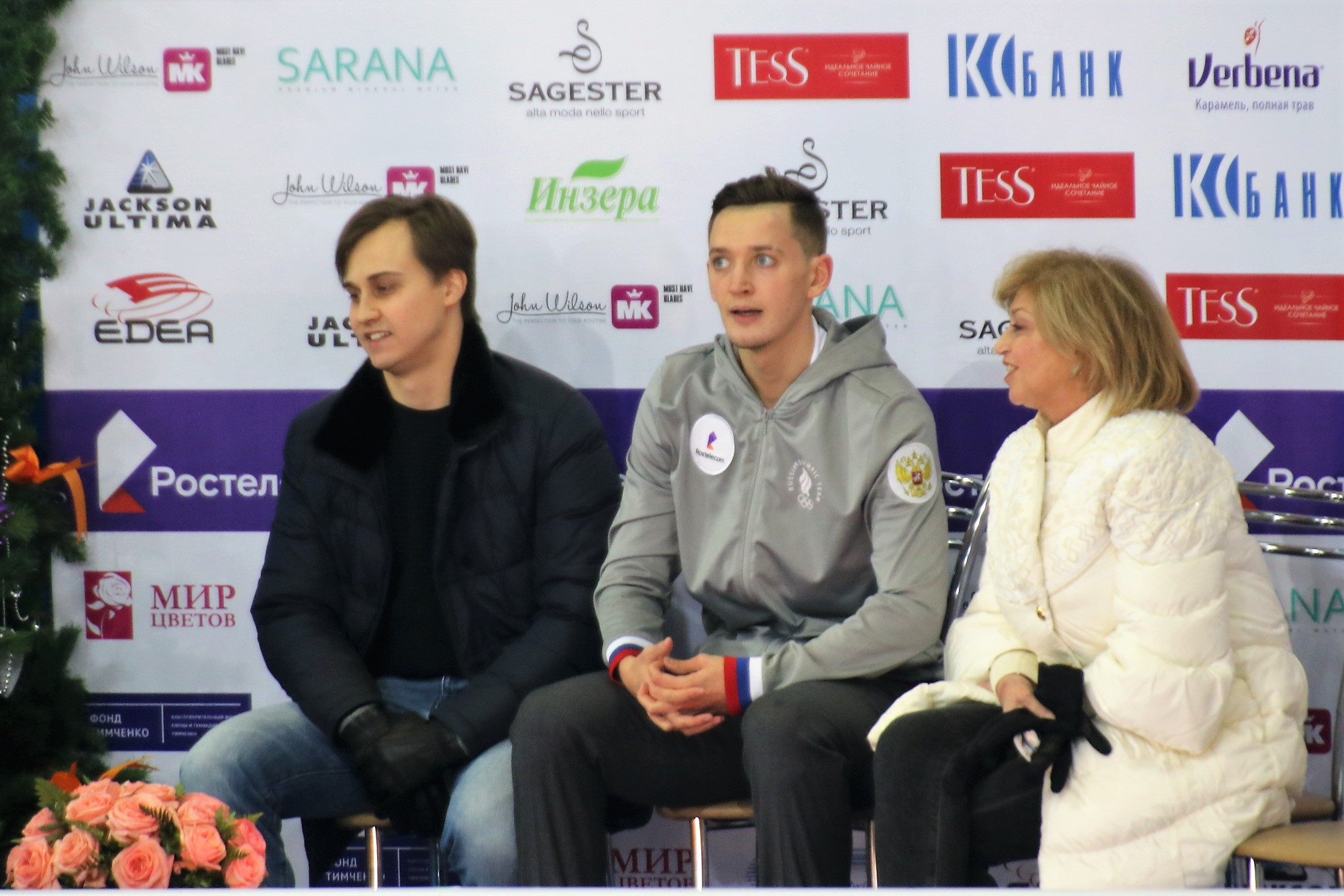 Максим Ковтун с тренерами Александром Успенским и Еленой Буяновой на чемпионате России по фигурному катанию на коньках 2019